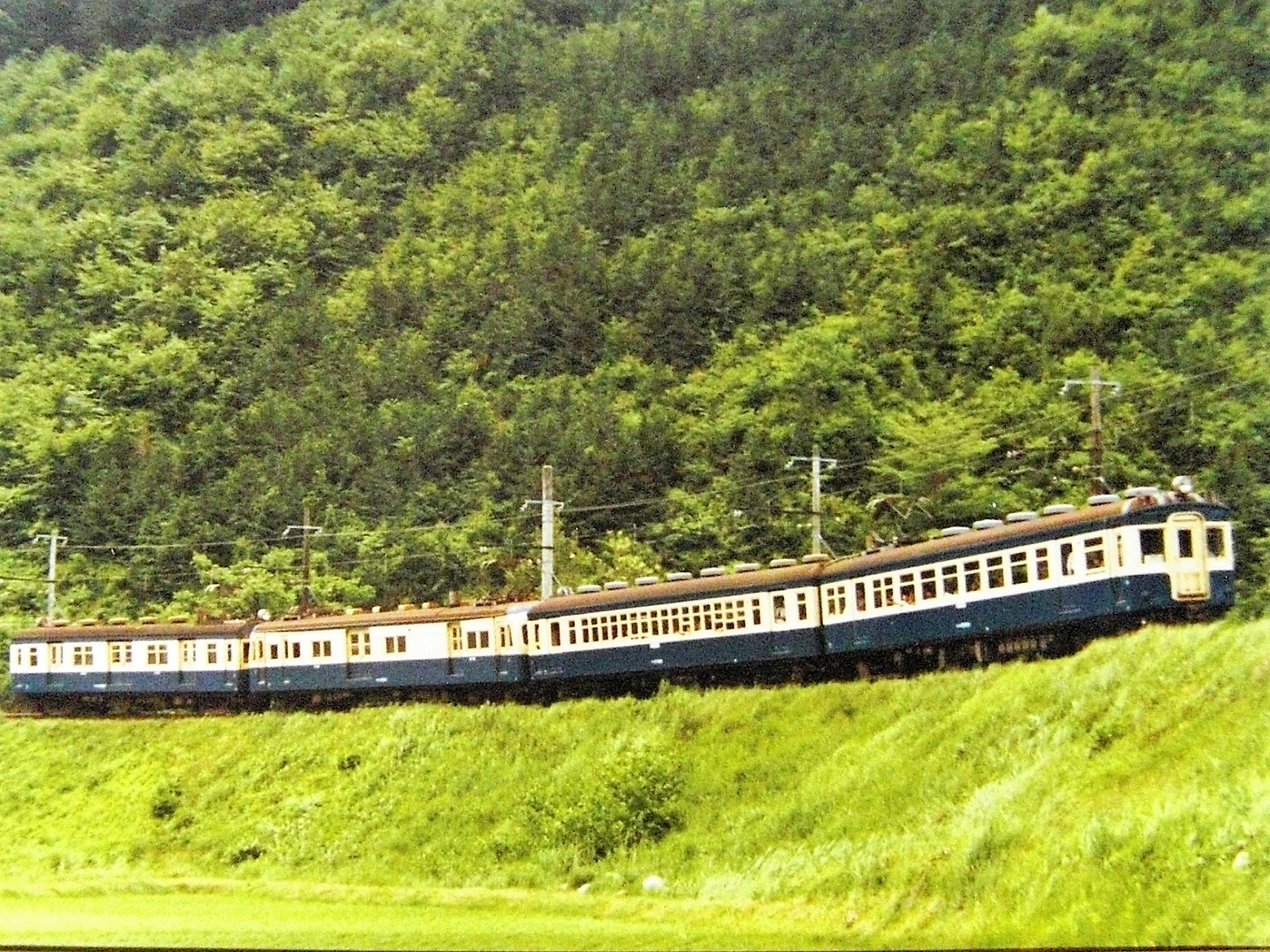 国鉄飯田線電車 旧形国電末期の編成 先頭はクモハ53008 1983年撮影